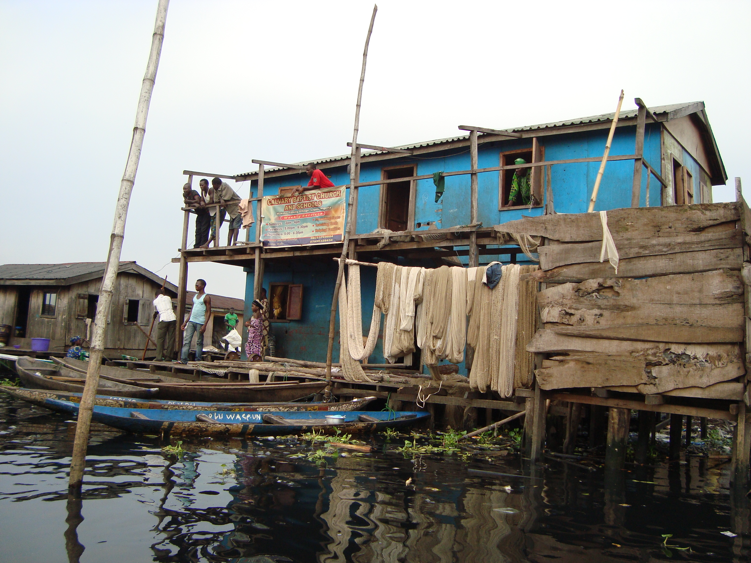 Foto: Heinrich-Böll-Stiftung